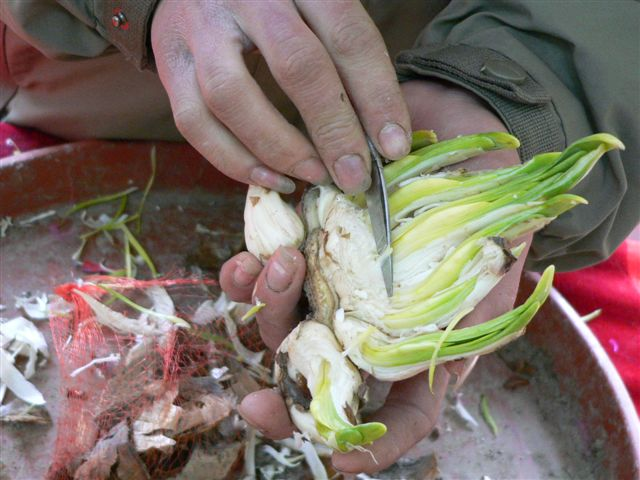 水仙雕刻 2005年2月6日拍摄于北京北海公园阐福寺花展，买了一头水仙，请师傅雕刻。